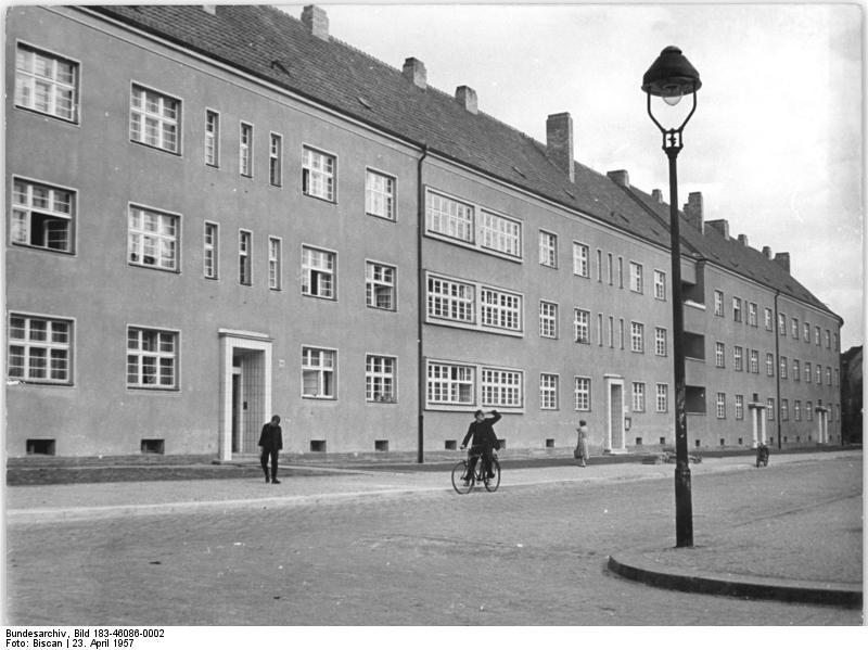 Zentralbild-Biscan 23.4.1957 Erfolgreiche Baugenossenschaft in Magdeburg 800 zerstörte Wohnungen wieder aufgebaut. Die Heimstätten-Baugenossenschaft in Magdeburg-Westernplan ist zwar nicht die größte Baugenossenschaft in der Deutschen Demokratischen Republik, aber eine sehr erfolgreiche. Sie verlor während des Krieges durch Bomben 52 % ihres Bestandes an Wohnraum und 40 % wurde beschädigt. Durch 9 Millionen DM staatliche Kredite und 2 Millionen eigene Mittel war es möglich, daß die Baugenossenschaft in den vergangenen Jahren 800 der zerstörten Wohnungen wieder instandsetzen und 600 Wohnungen neu bauen. Weitere 130 Wohnungen sind augenblicklich im Bau. UBz.: Die Martin-Andersen-Nexö-Straße heute. Die Wohnungen wurden von der Baugenossenschaft wieder instandgesetzt.